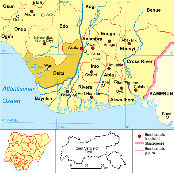 politische Karte Nigerias (Bundesstaat Delta hervorgehoben)